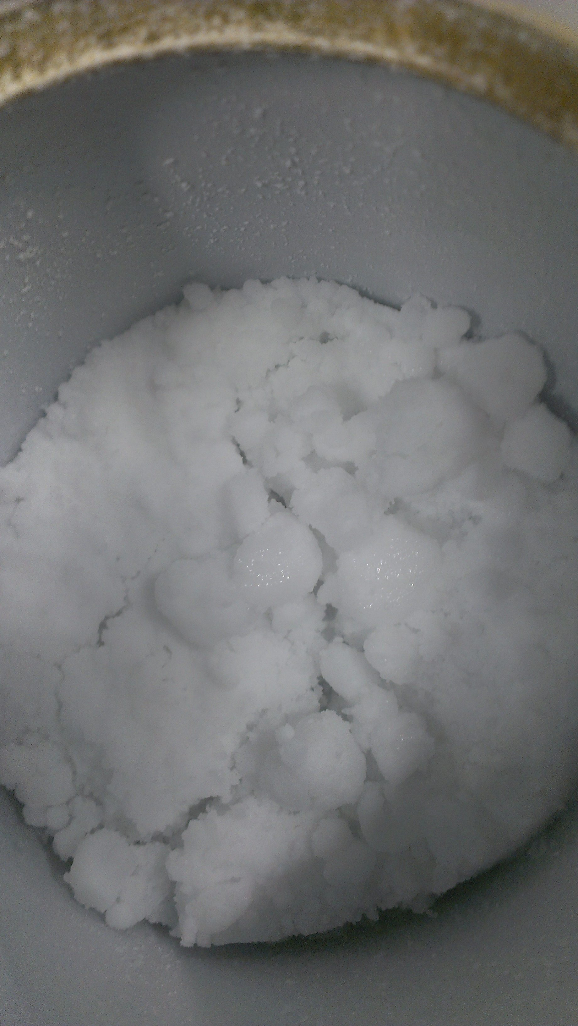 Olis dsipergeeritud naatriumhüdriid